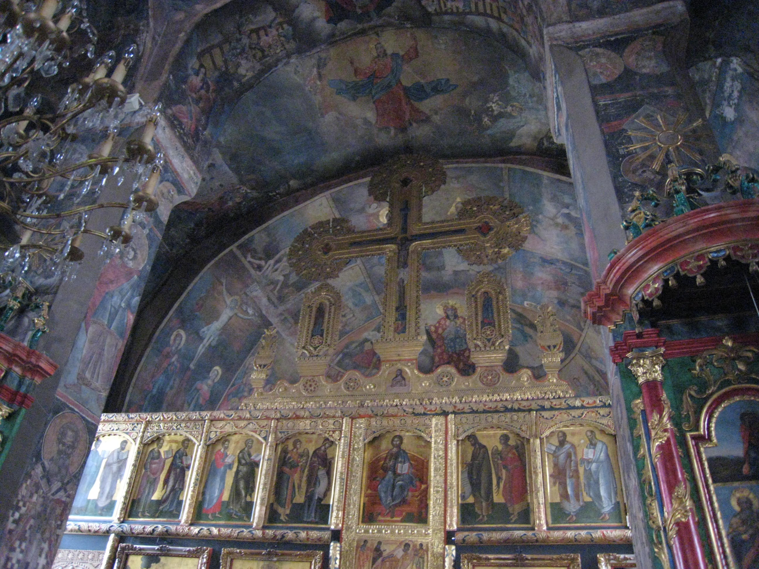 Frescos monasterio de Studenica